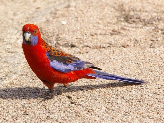 Crimson Rosella (Platycercus elegans), Mt Buffalo.